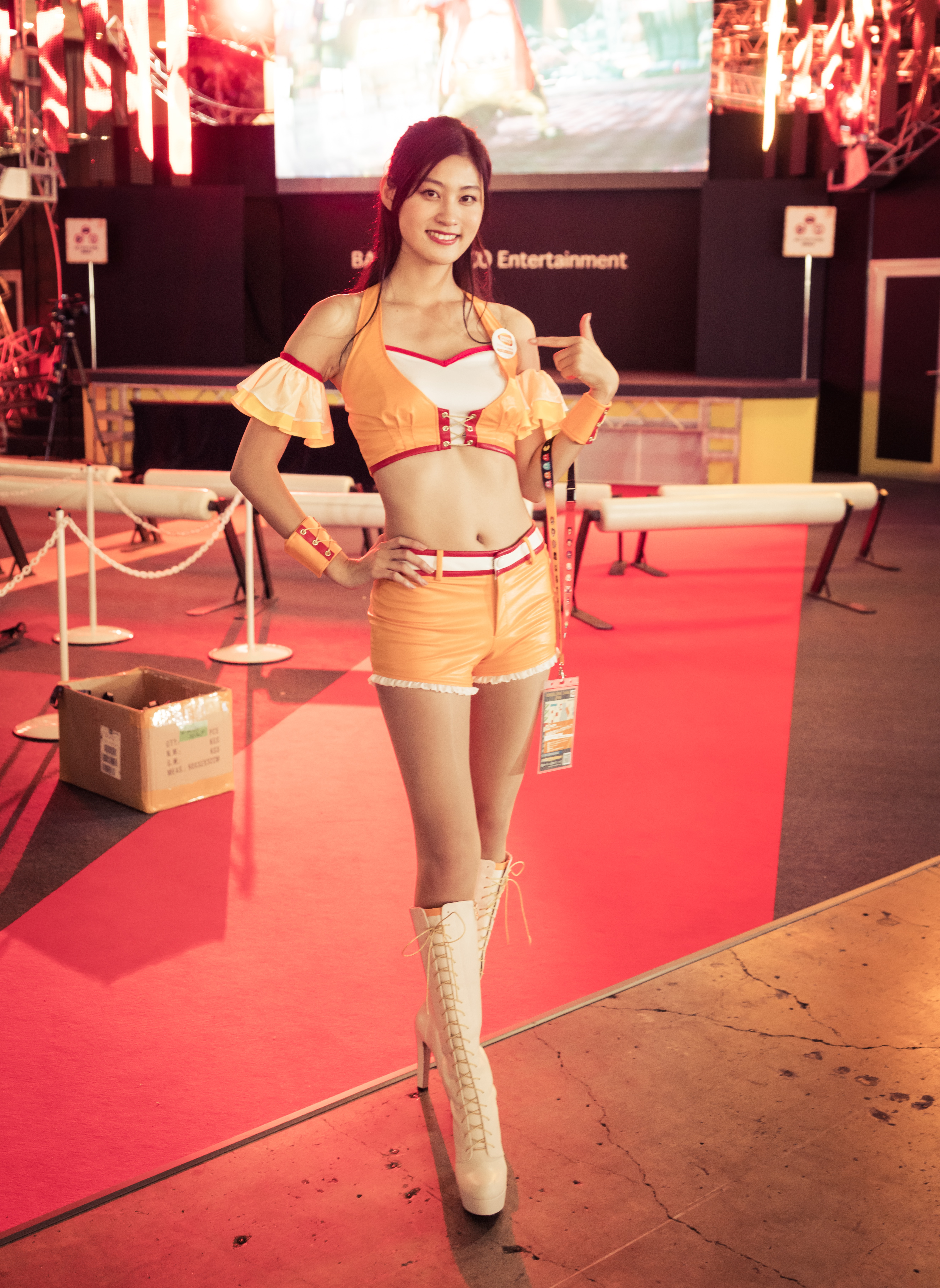 Tokyo Game Show 2018 (TGS)